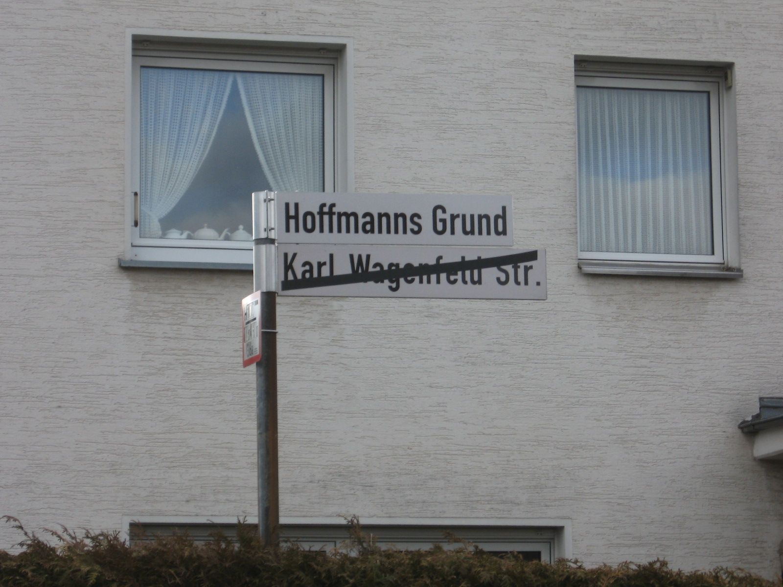 Die umbenannte Karl-Wagenfeldstr. in Sundern nach der Umbenennung in Hoffmanns Grund.